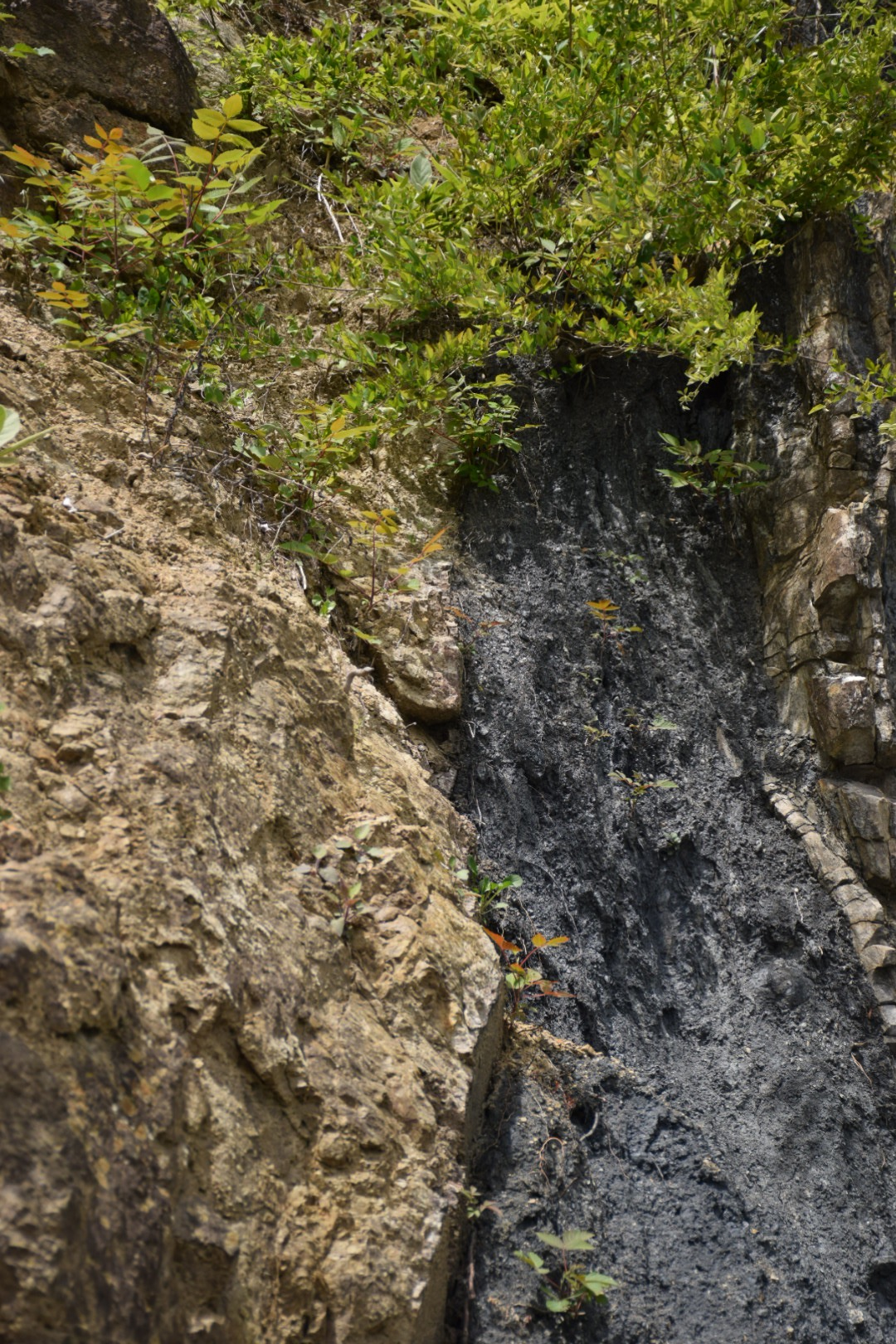 長野県伊那市長谷村にある中央構造線溝口露頭。 南アルプスジオパークのジオサイトに指定されている。 断層が露出しており、中央構造線の様子を観察することができる。